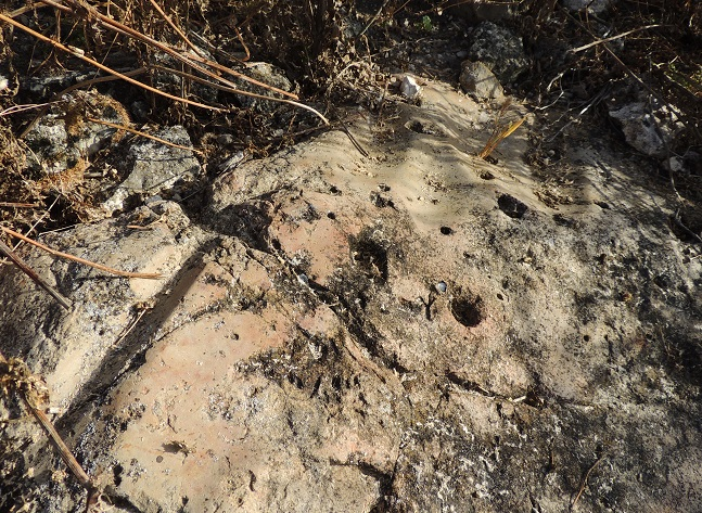 Polissoir de Haute Bretagne: une grande strie nette sur la gauche de ce grès brun local, des cupules, et en haut des zones de polissage creusées. Herbes séchées autour